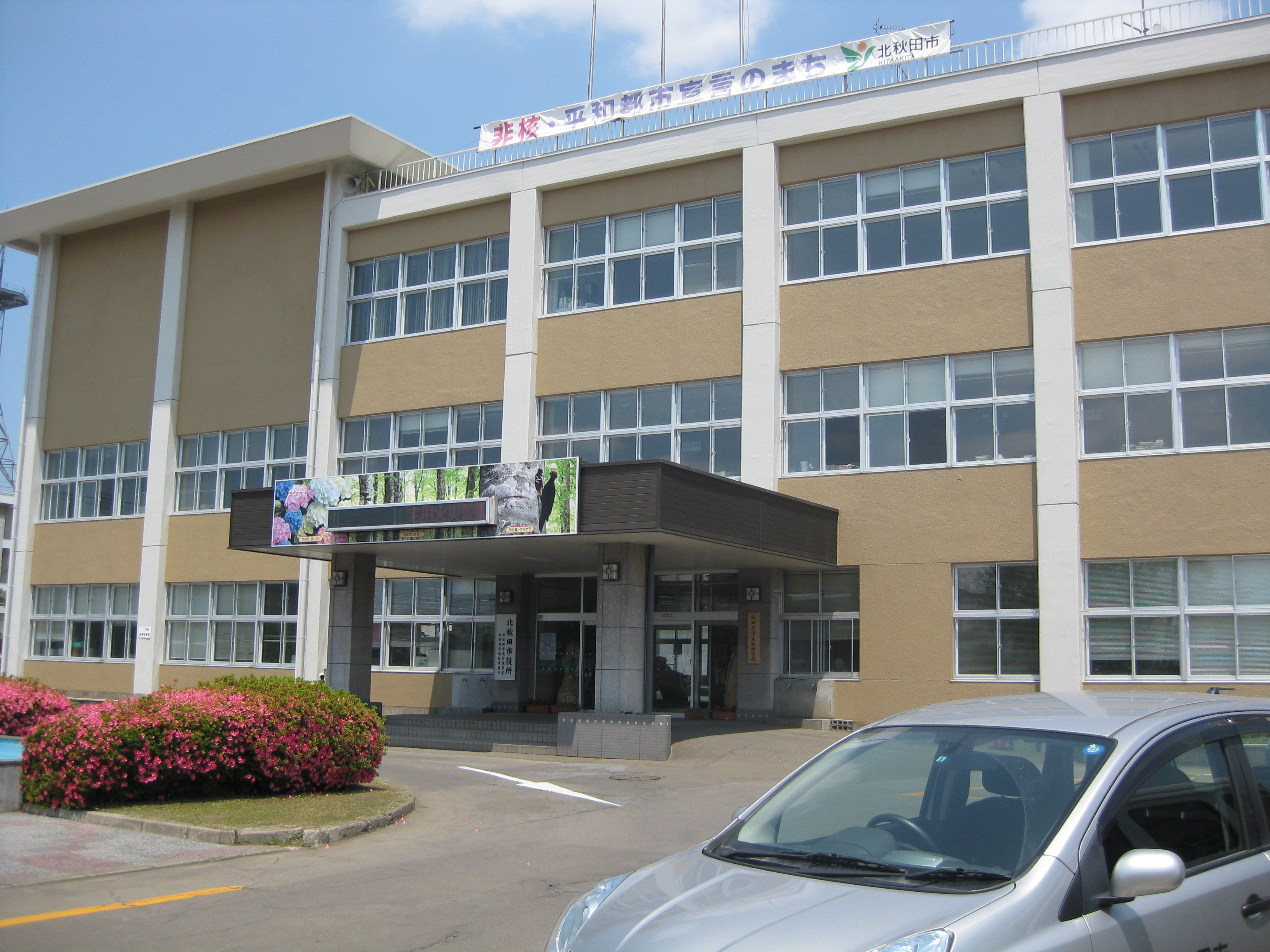 北秋田市役所